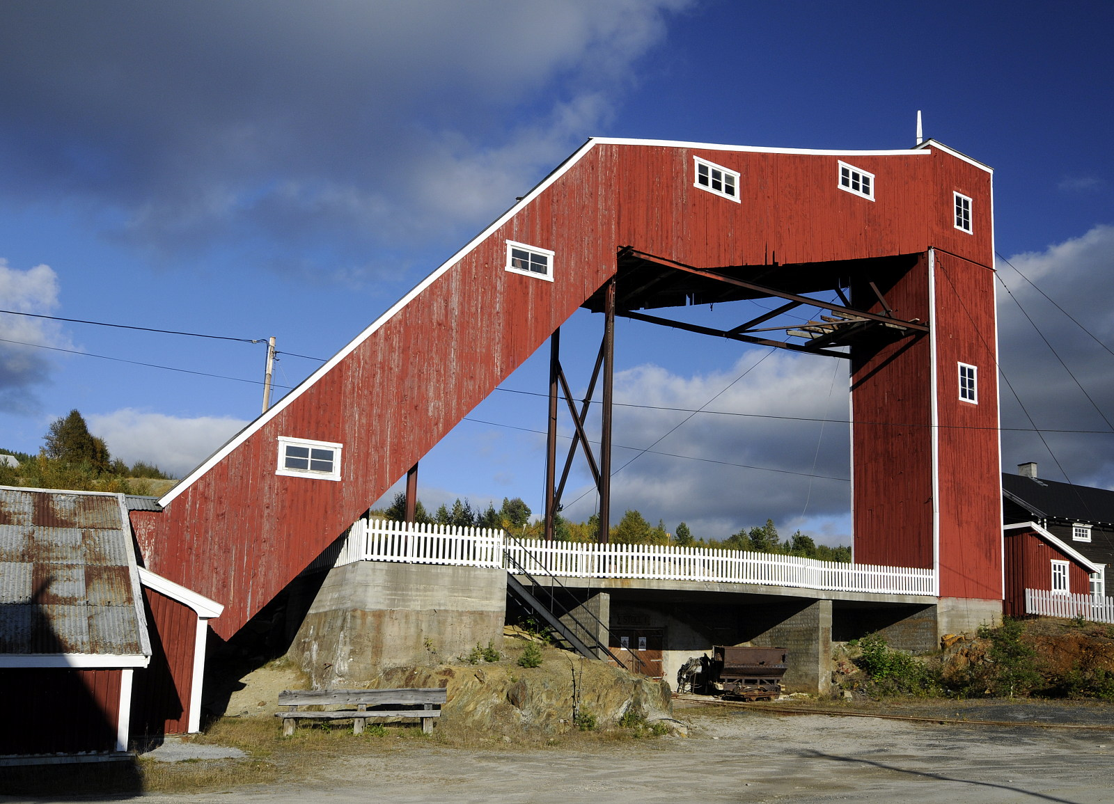 Hovedgruva ved Folldal gruver